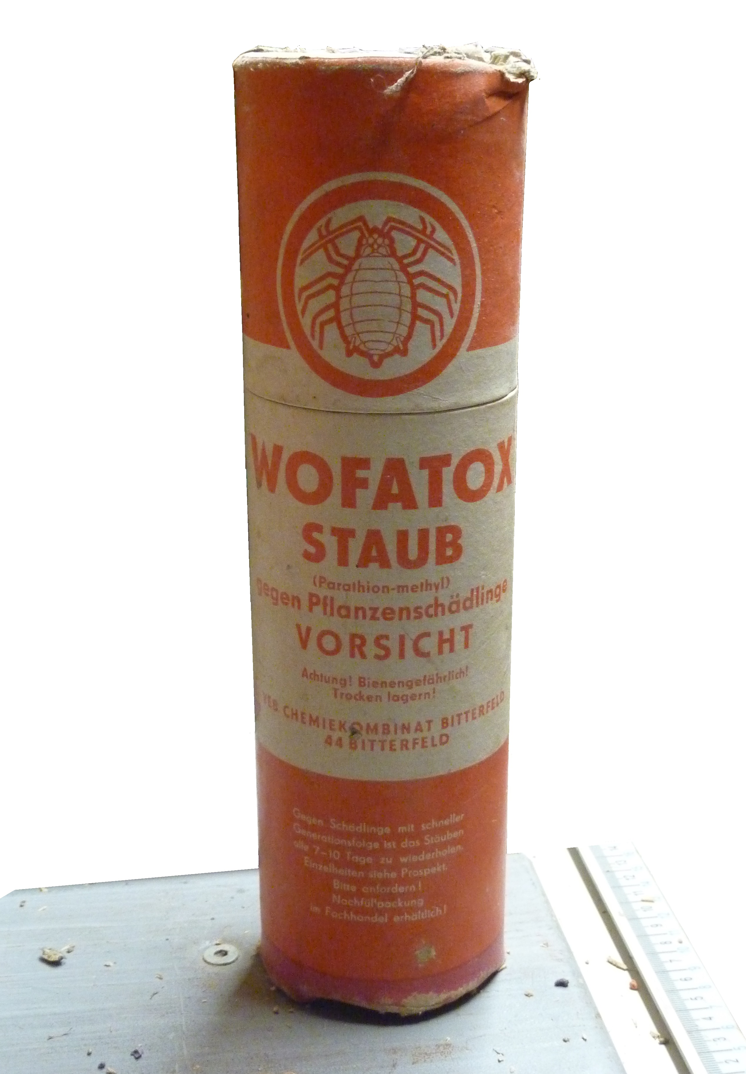 Wofatox-Staub des VEB Chemiekombinat Bitterfeld. Wirkstoff: Parathion-methyl